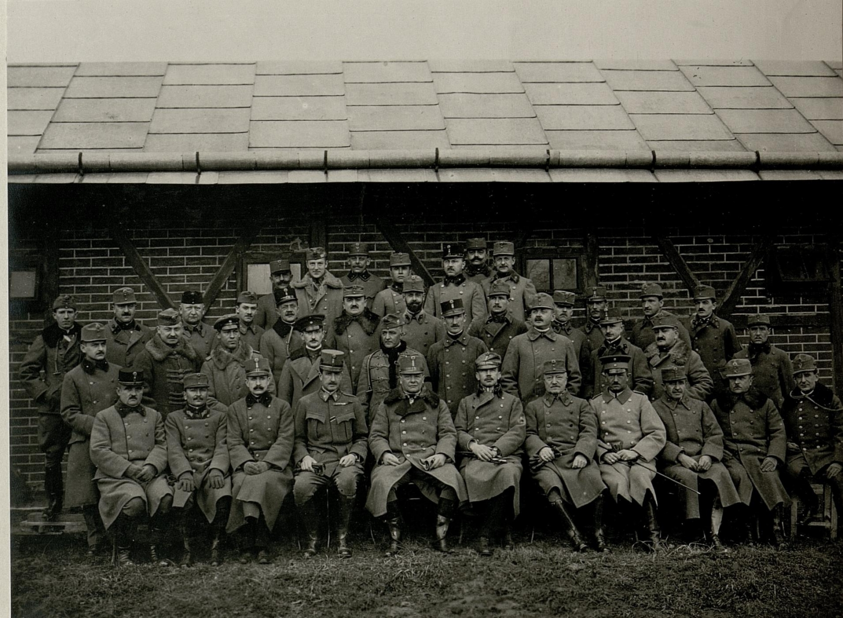 Stab des k.u.k.7.A.K.